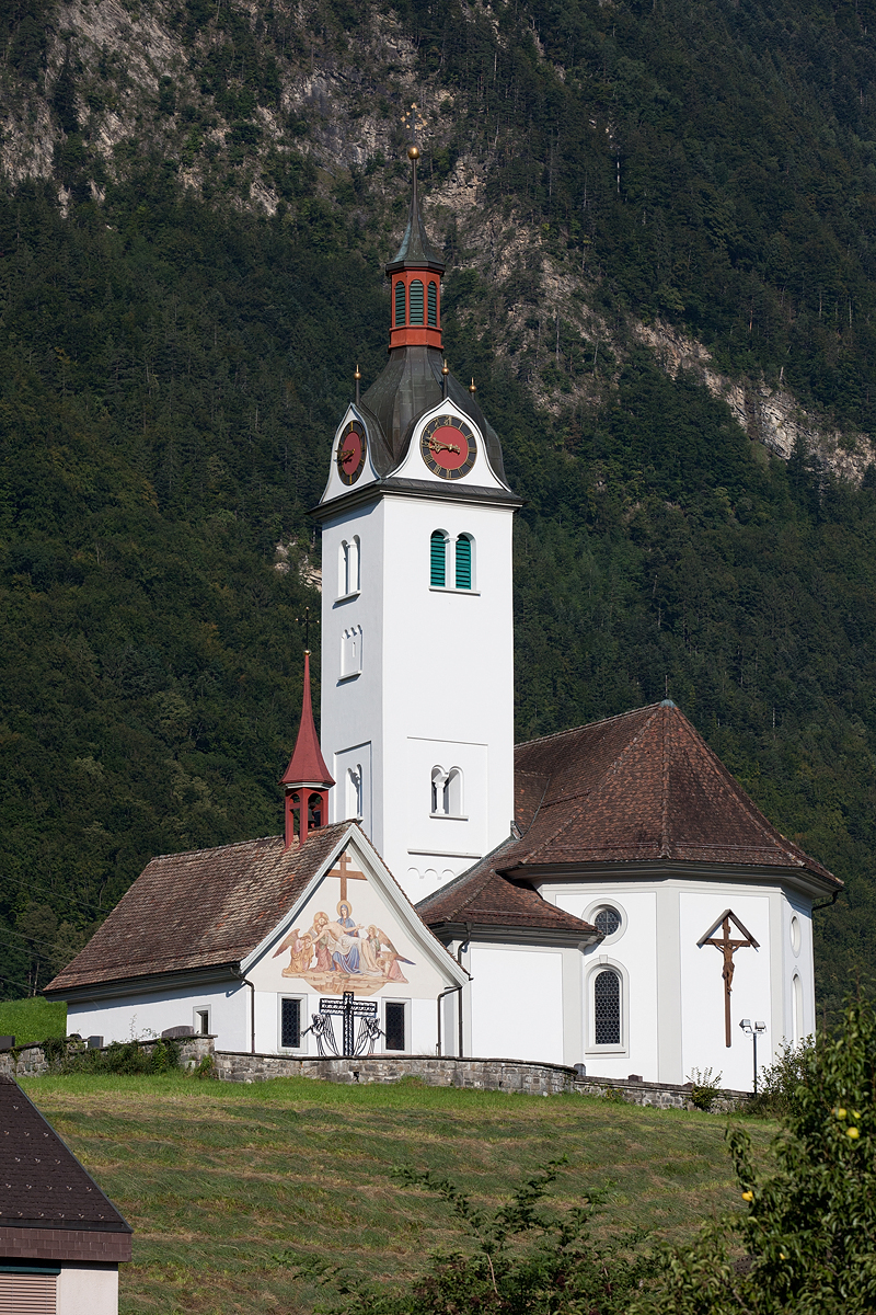 Pfarrkirche St. Andreas in Attinghausen